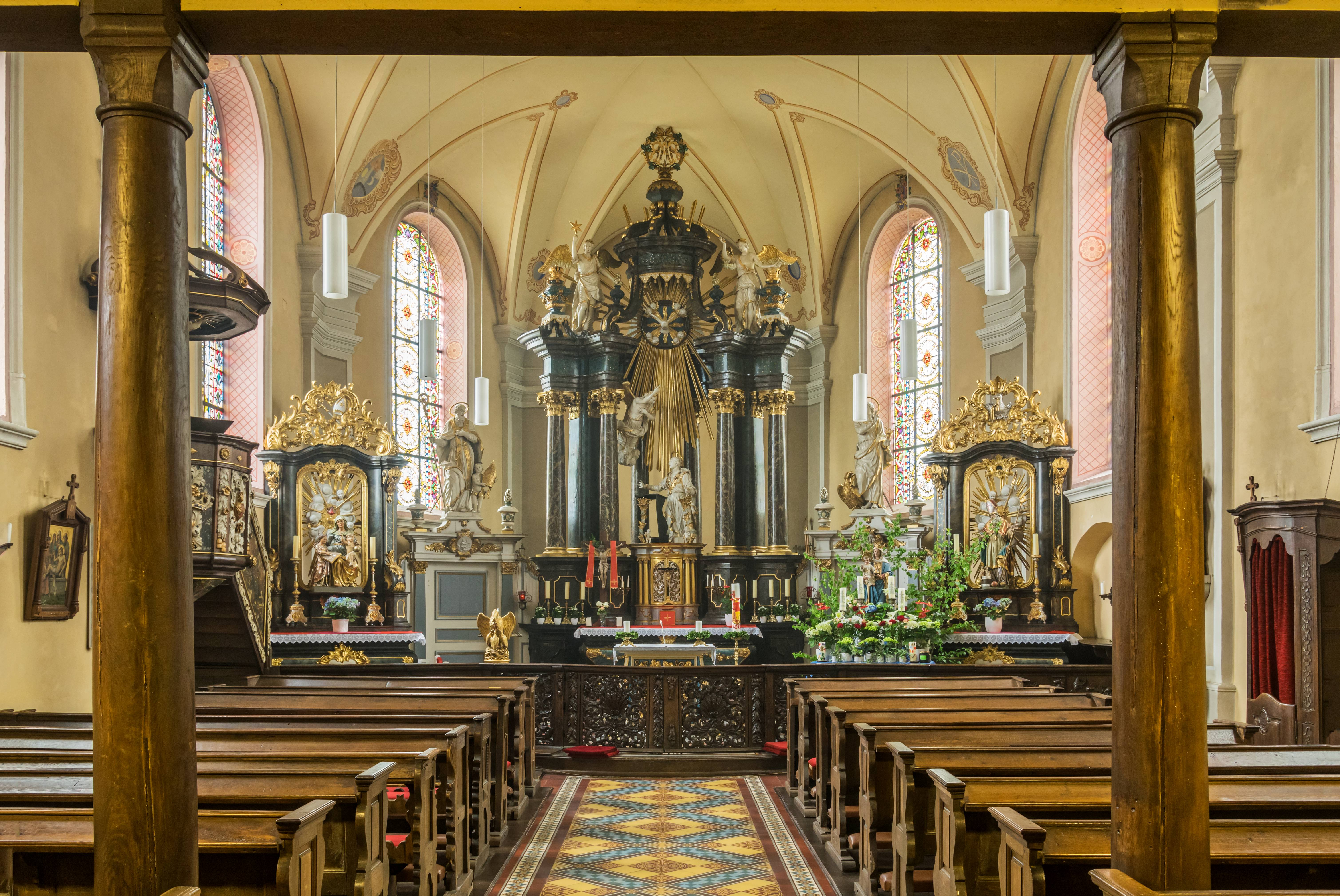 Bilder von der Kirche St Nikolaus in Aremberg Bilder aus dem Innenraum der Kirche